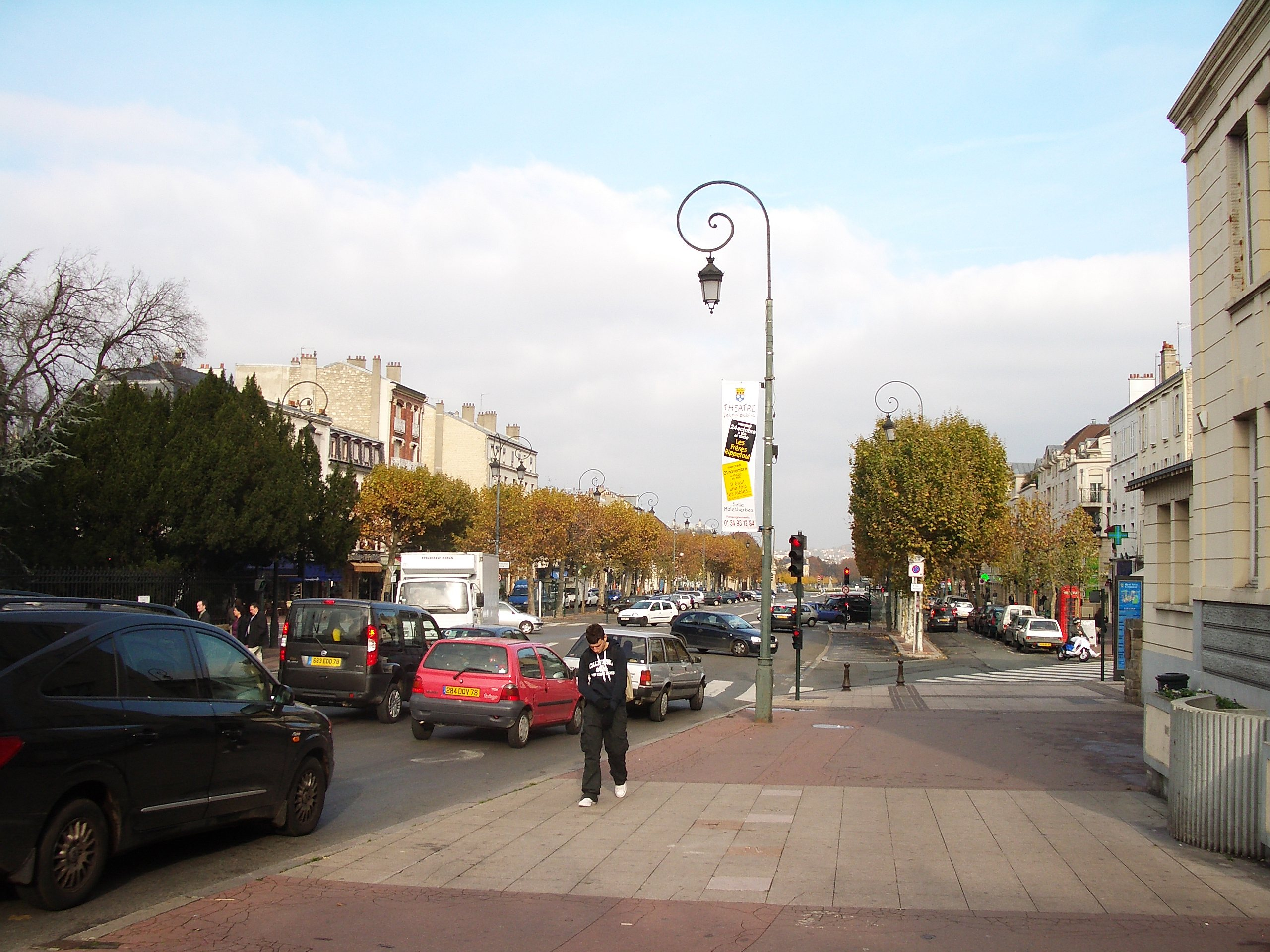 L'avenue de Longueil à la ville de Maisons Laffitte, France.